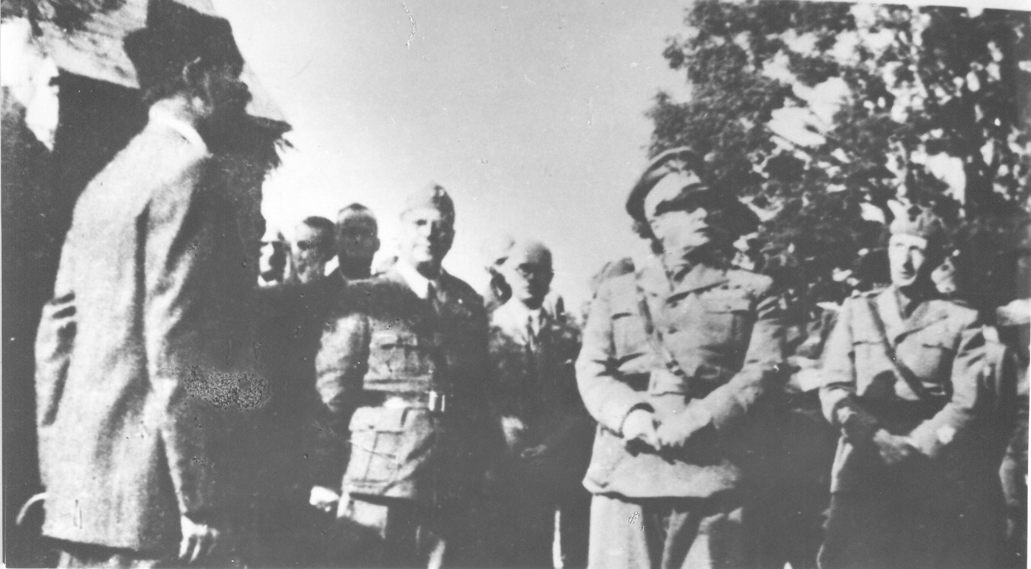 Srpskohrvatski / српскохрватски: Bajo Stanišić sa generalom Pircijom Birolijem, u danima kada je otvoreno stupio u službu italijanskog okupatora.